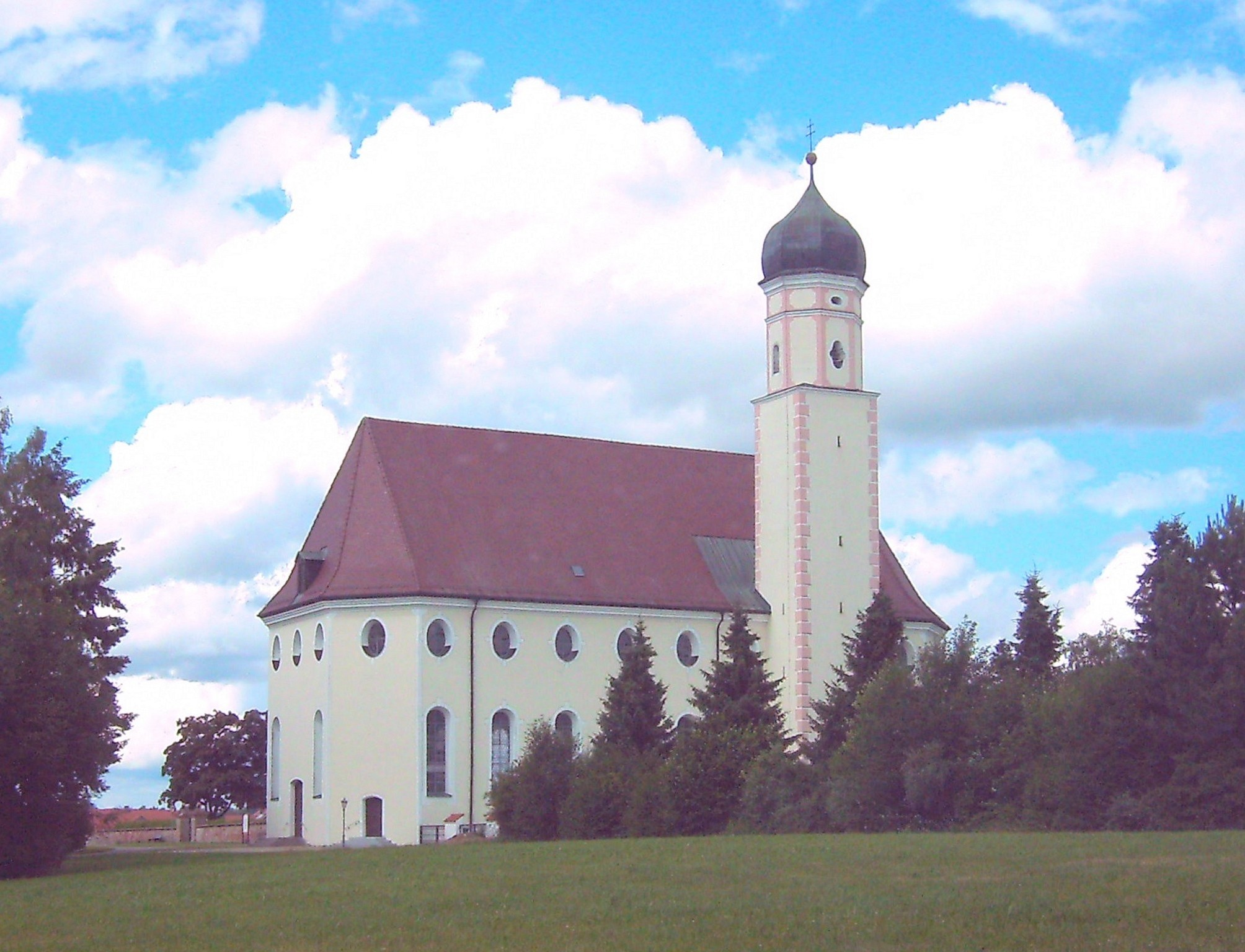 Außenansicht der röm.-kath. ehemaligen Rosenkranzbruderschaftskirche St. Johann in 88430 Rot a. d. Rot, Deutschland